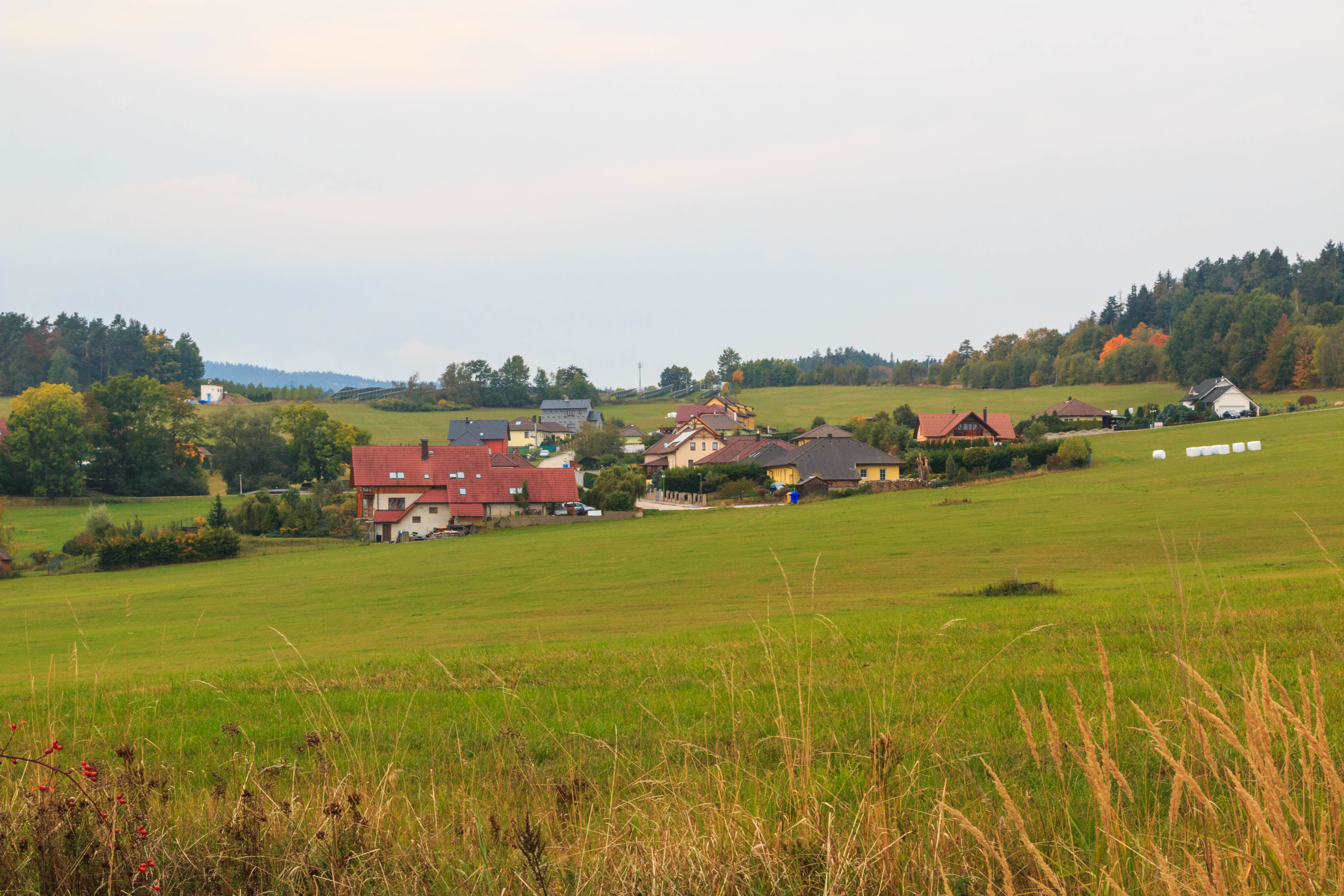 Pohled na Pěčnov ze silnice od Chluman